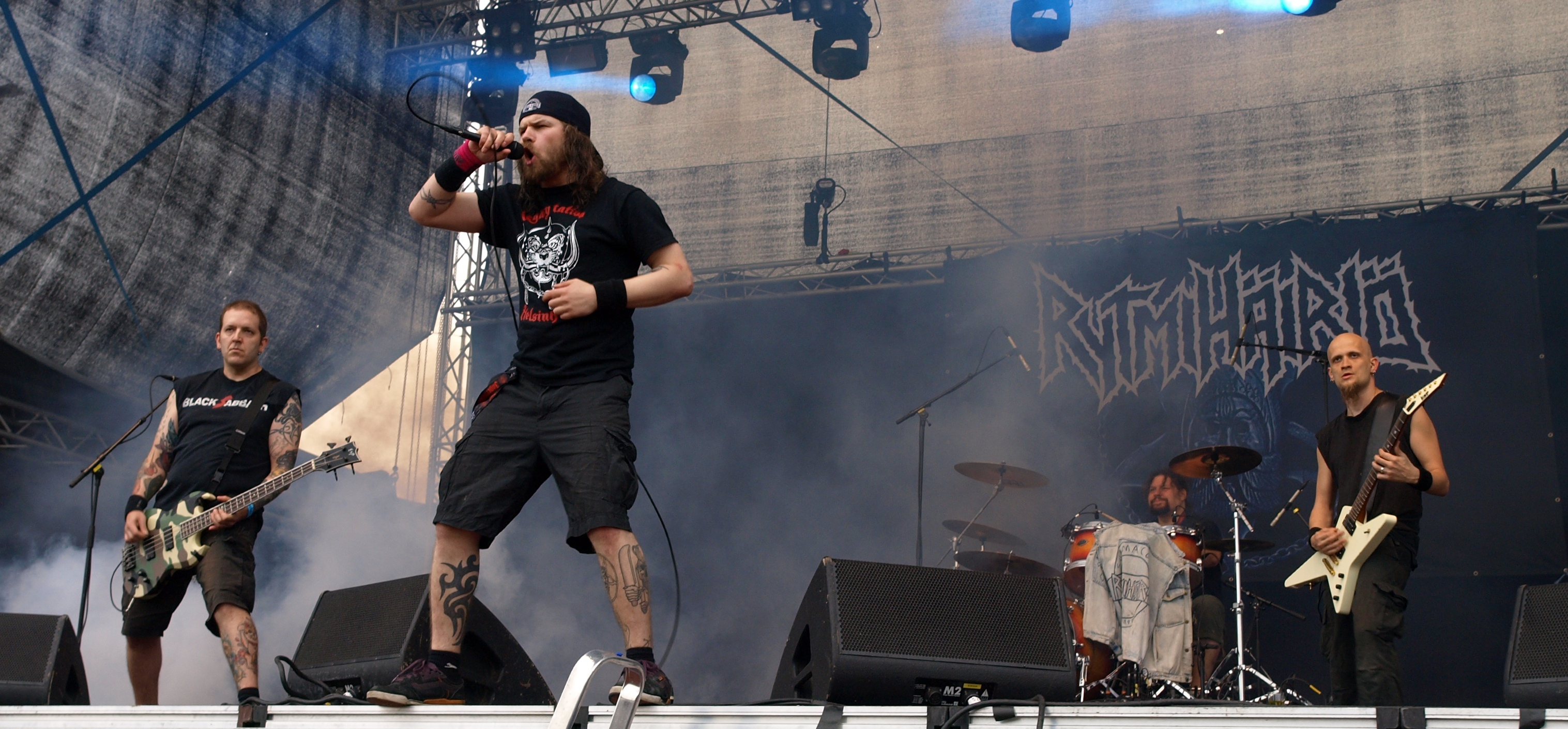 Rytmihäiriö live am Myötätuulirock 2011